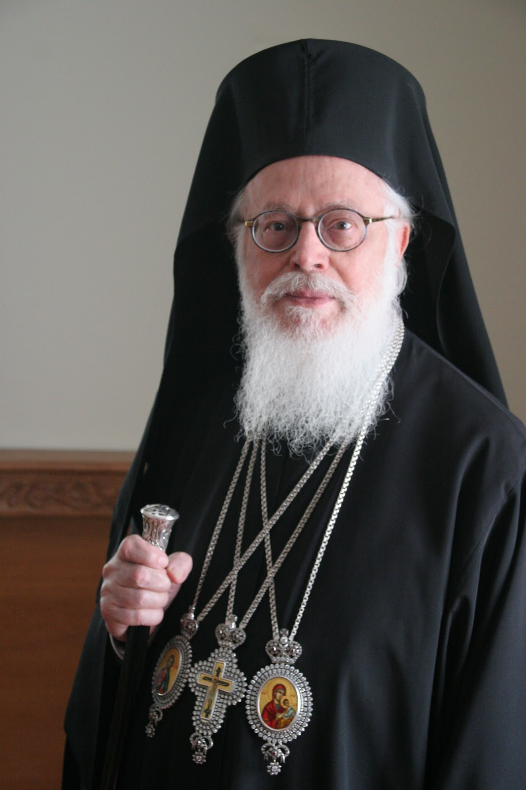 Archbishop Anastasios